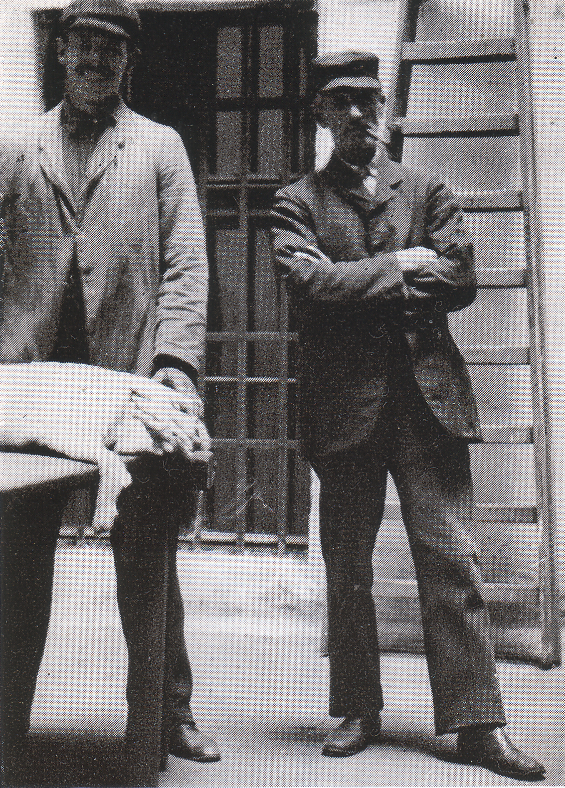 Bildunterschrift: „Onkel“ Adolf [Reik] und „Onkel“ Wilhelm. (Hausdiener in der Pelzwarenhandlung Willi Weiss) Zitat: Hier möchte ich doch ein paar Worte über die Angestellten meines Vaters einfügen. Das Verhältnis zu diesen kann man nur als patriarchalisch bezeichnen. Alle waren irgendwie „Typen“. Jeder gehörte gewissermaßen zu unserer Familie, wir konnten uns das Leben ohne, wie wir sie nannten, „Onkel“ Hermann, Adolf etc einfach nicht vorstellen. Adolf Reik, der Ladendiener, ein alter Junggeselle, war in seiner Jugend Cowboy in Amerika. Er brachte mir die ersten englischen Worte bei und ich lauschte mit Begeisterung seinen Erzählungen. „Onkel“ Adolf brachte mich und meine Schwester zur Schule; seine Krankheit und Tod war eine der größten Katastrophen, an die ich mich besinne. [...] Wilhelm, ein anderer Hausdiener, brachte mir viel Lebensweisheit bei und - als sehr begabter Mensch - eines besseren Schicksals würdig. Leider überlebte dieser, wie auch ein zweiter Angestellter, die serbische Offensive nicht...